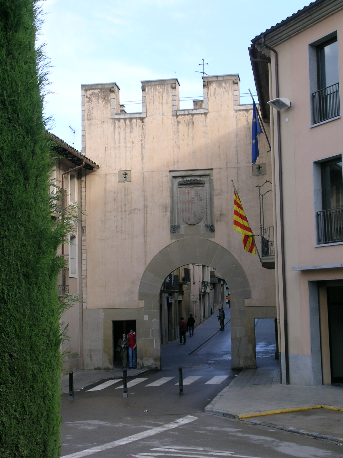 Portal del municipi de Centelles